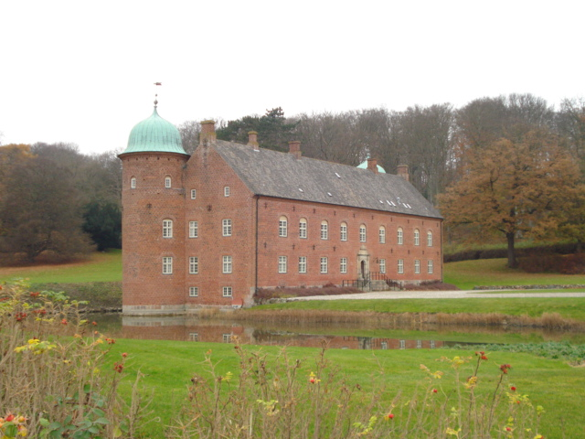 Rosenvold Caste, Jutland, Denmark